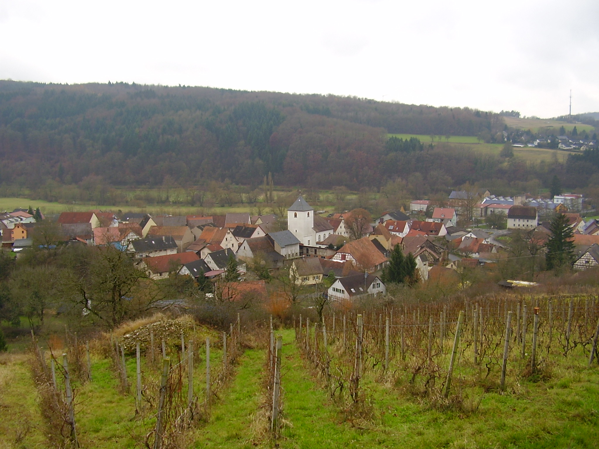 Ruchsen bei Möckmühl, älterer Teil und Ortskern.